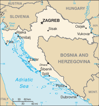 CIA Croatia map in Croat